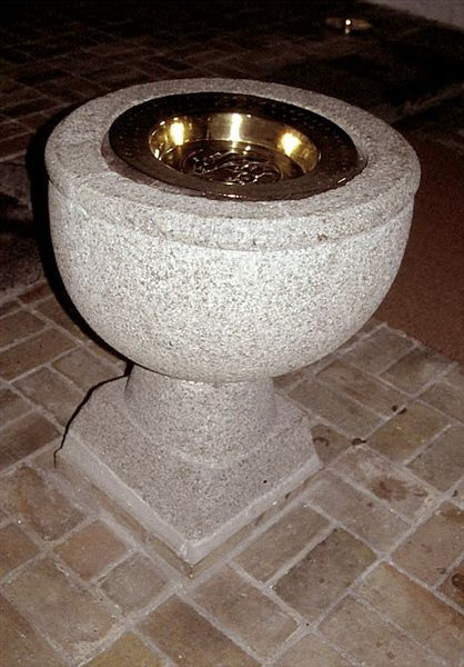 Tånum Kirke, Randers Kommune, døbefont